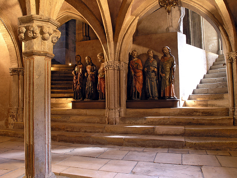 Crypte de la basilique Saint Sernin, Toulouse, France. Author : -- Eric Pouhier Date : August 2005